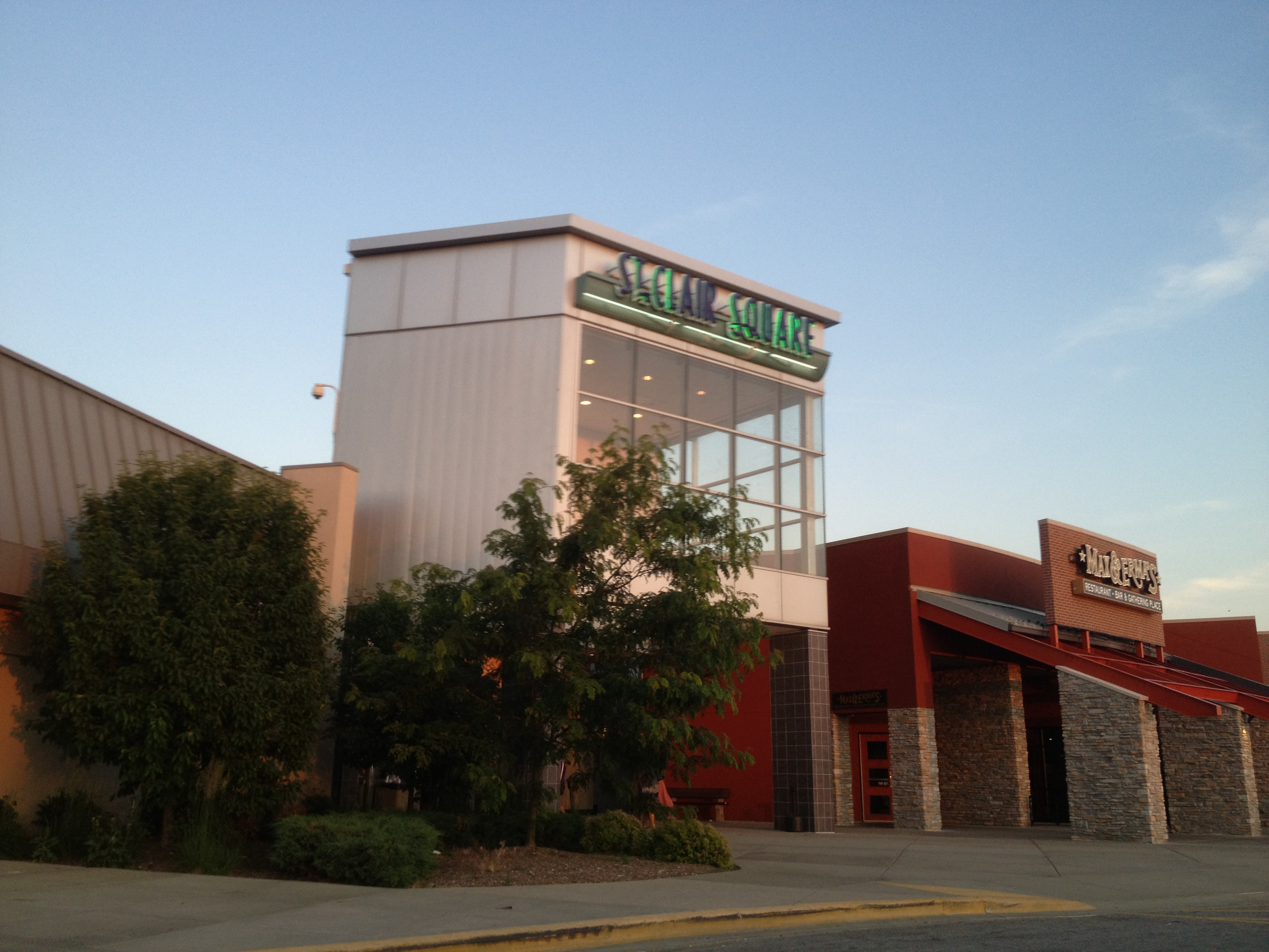 St Clair Square